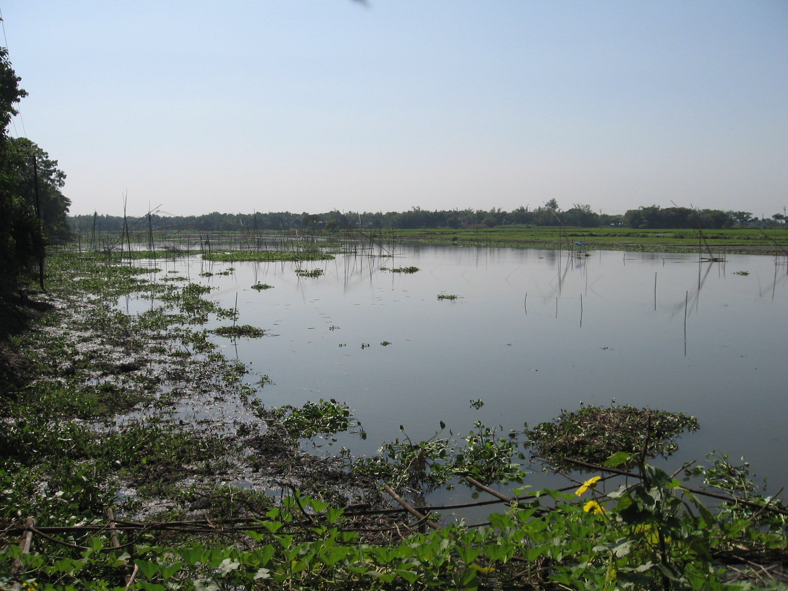 A beel in Tangail